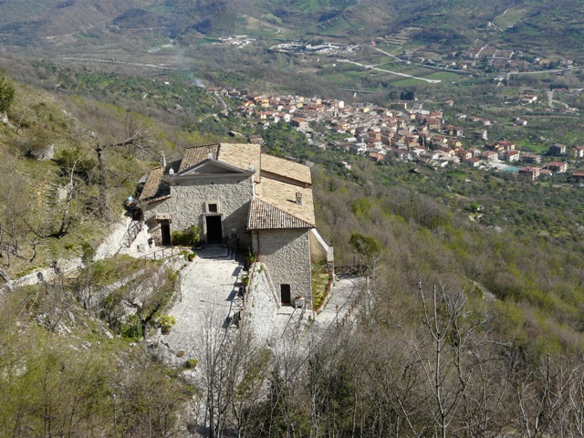 Panorama di Roccavivi da Roccavecchia